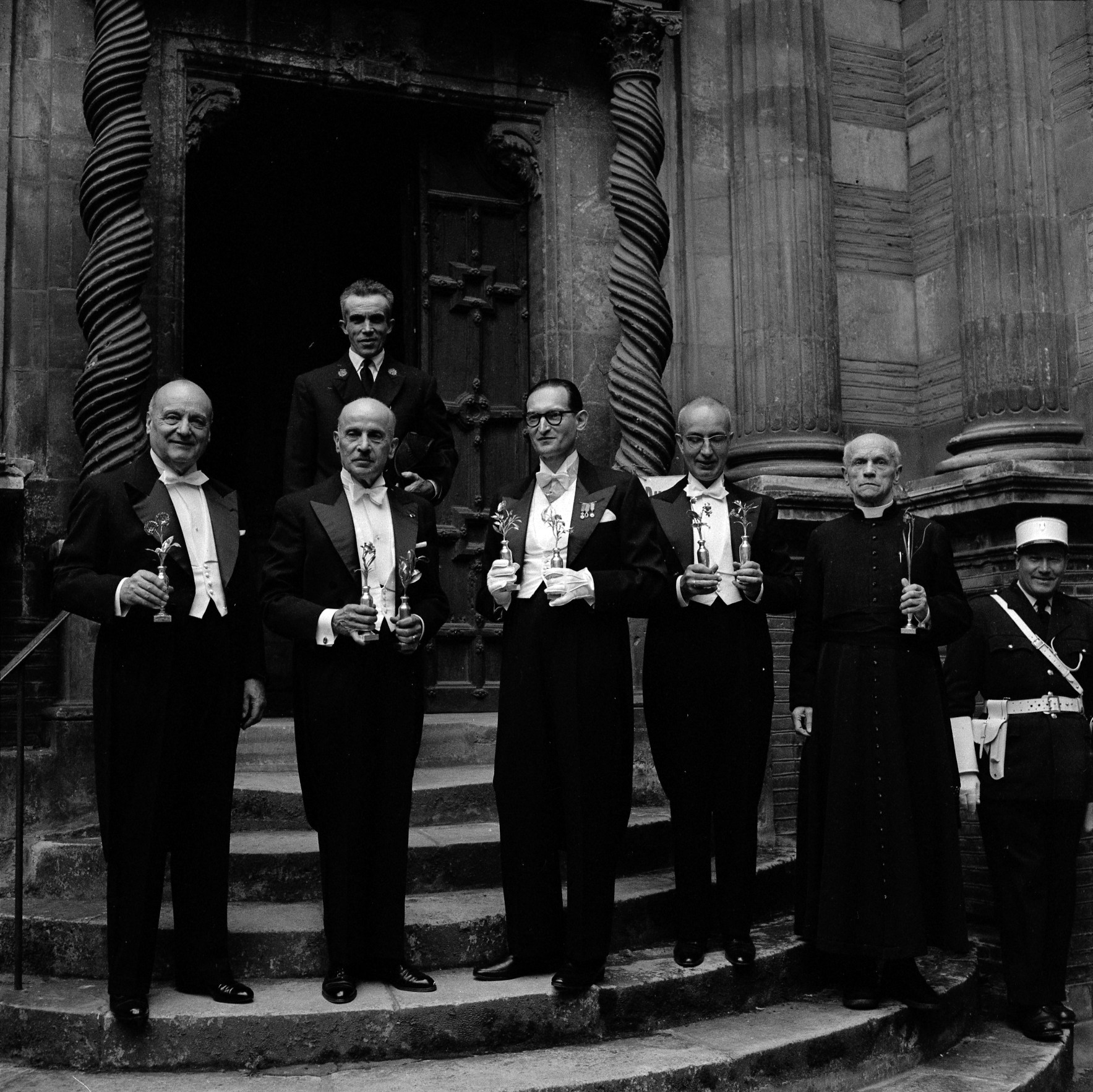 Hôtel d'Assézat. Le 8 Mai 1961. Vue des cinq gagnats posant avec leurs prix remis par l'académie des Jeux floraux, dans la cours de l'hôtel Assézat.